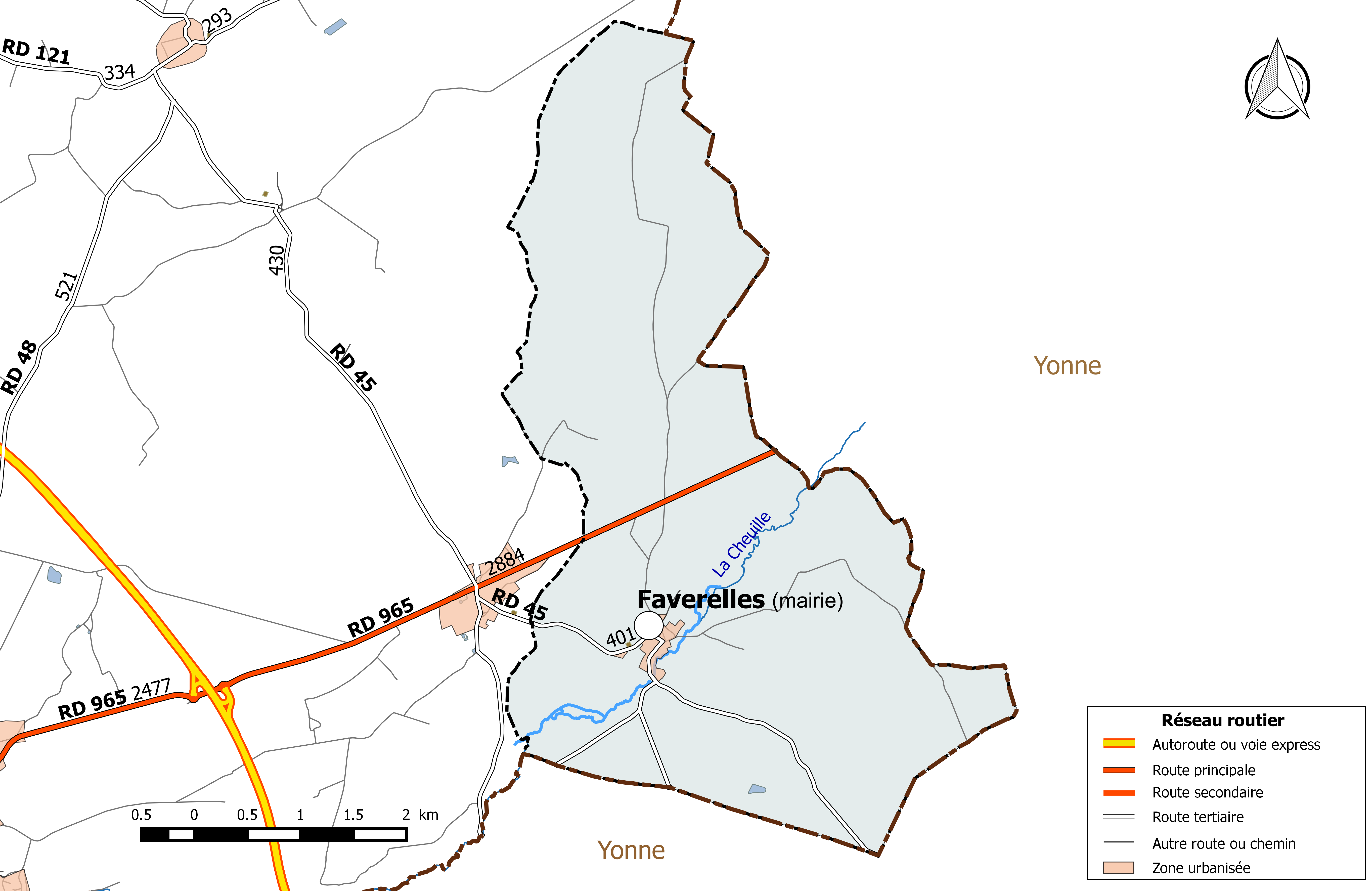 Carte du réseau routier de la commune de Faverelles.